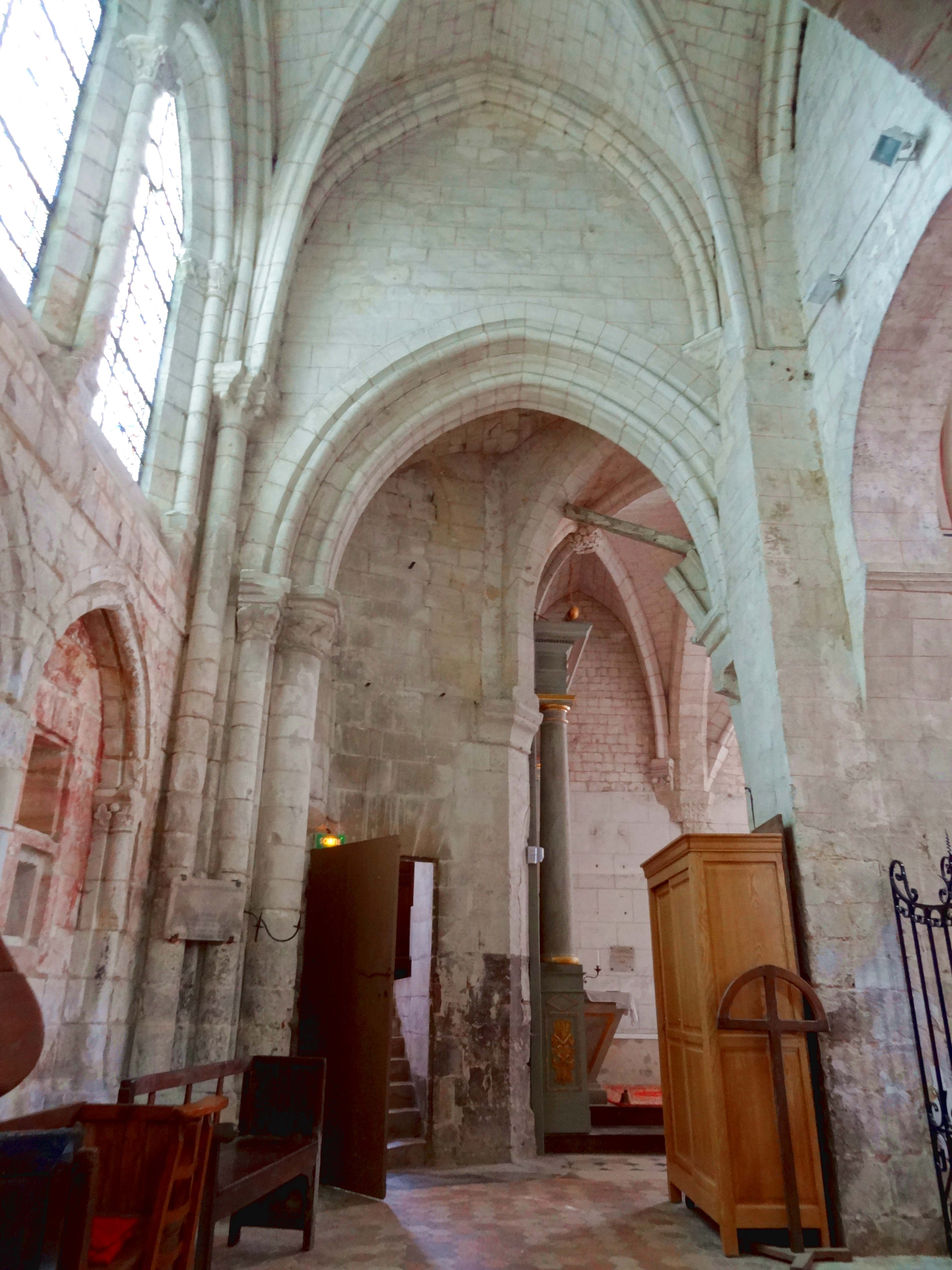 Intérieur de l'église - voir titre.